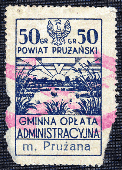 Беларуская (тарашкевіца): Аплатная марка гміны Пружана